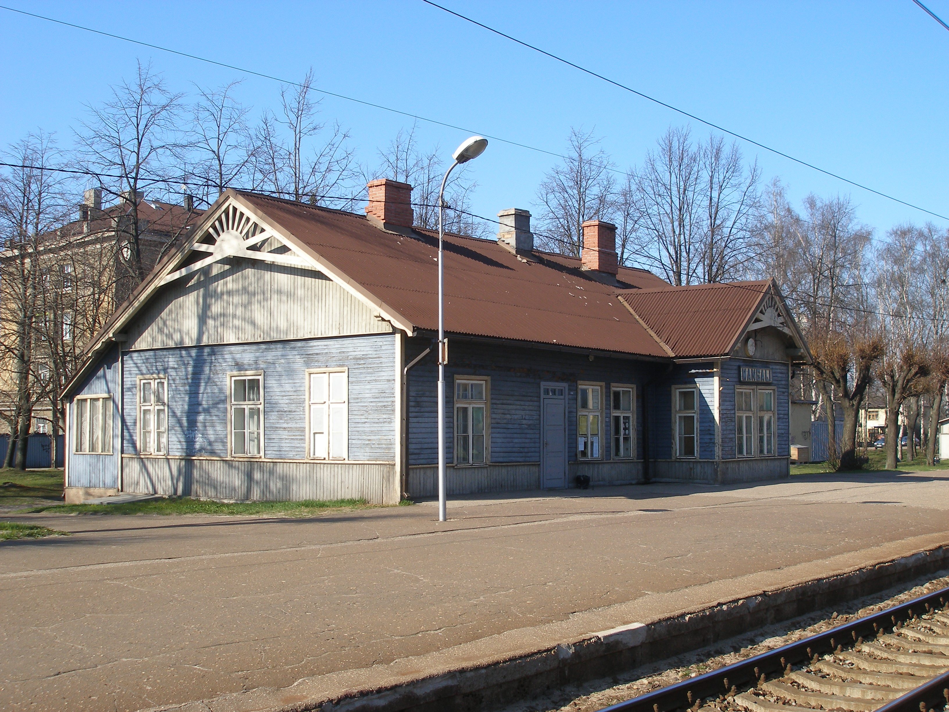 Mangaļu stacijas ēka